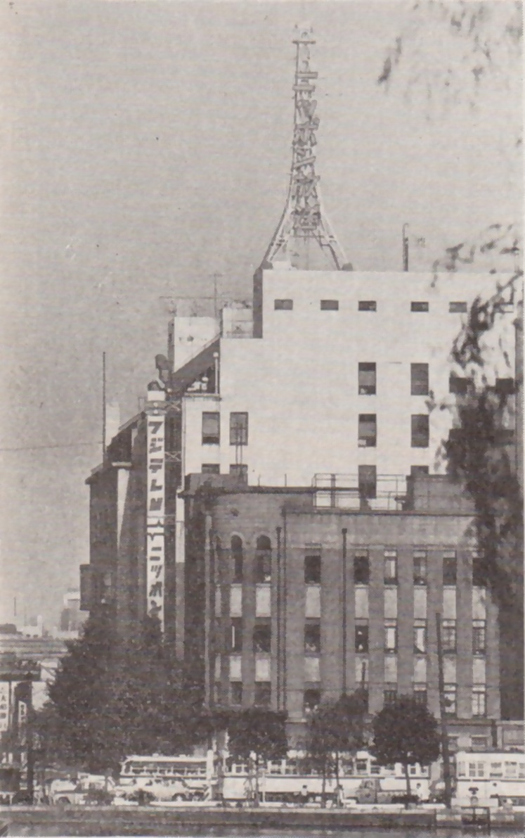 ニッポン放送本社屋、1961年ごろ（旧有楽町本社）当時はフジテレビの本社も所在。